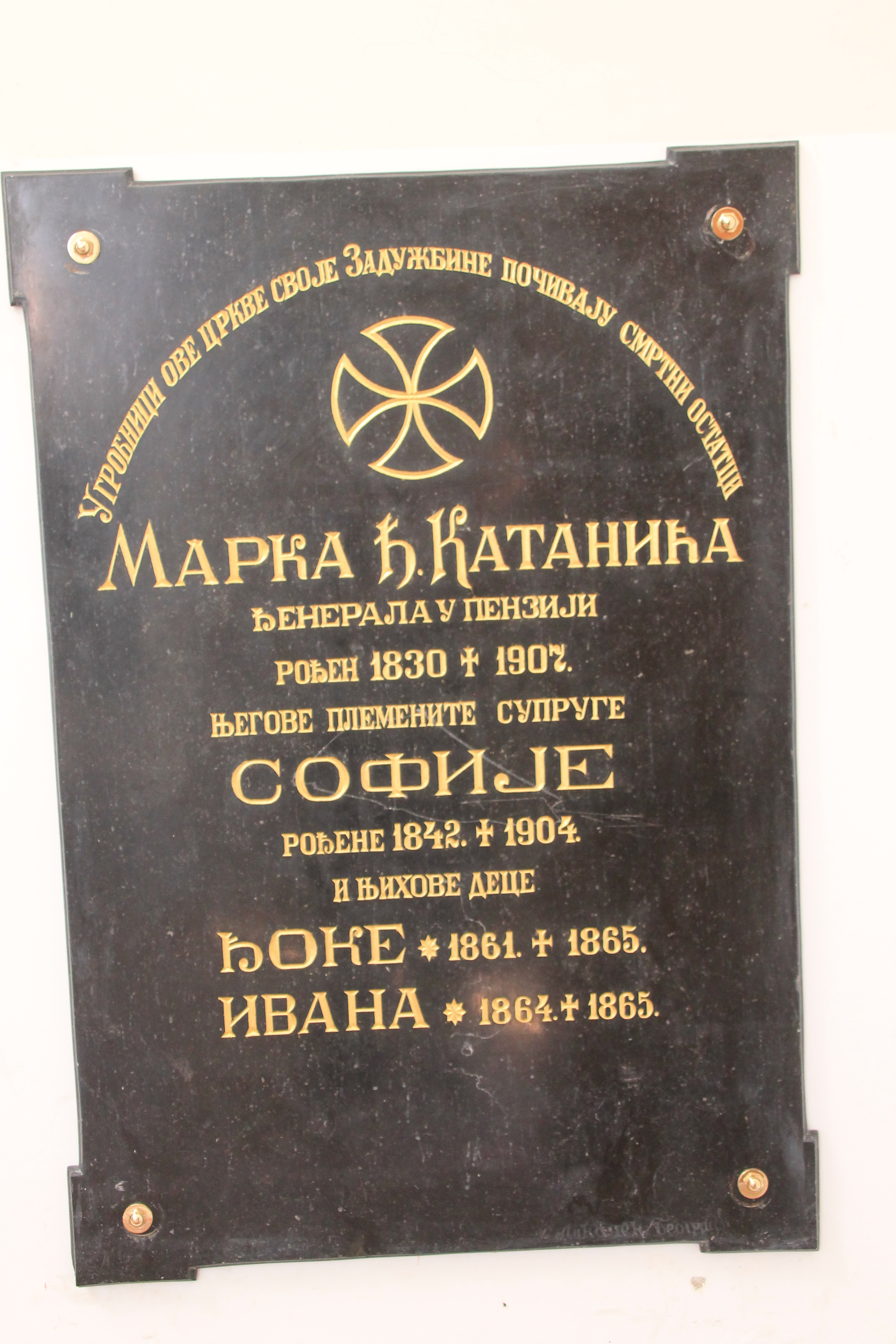 Crkva Sv. Marka (Bresnica)